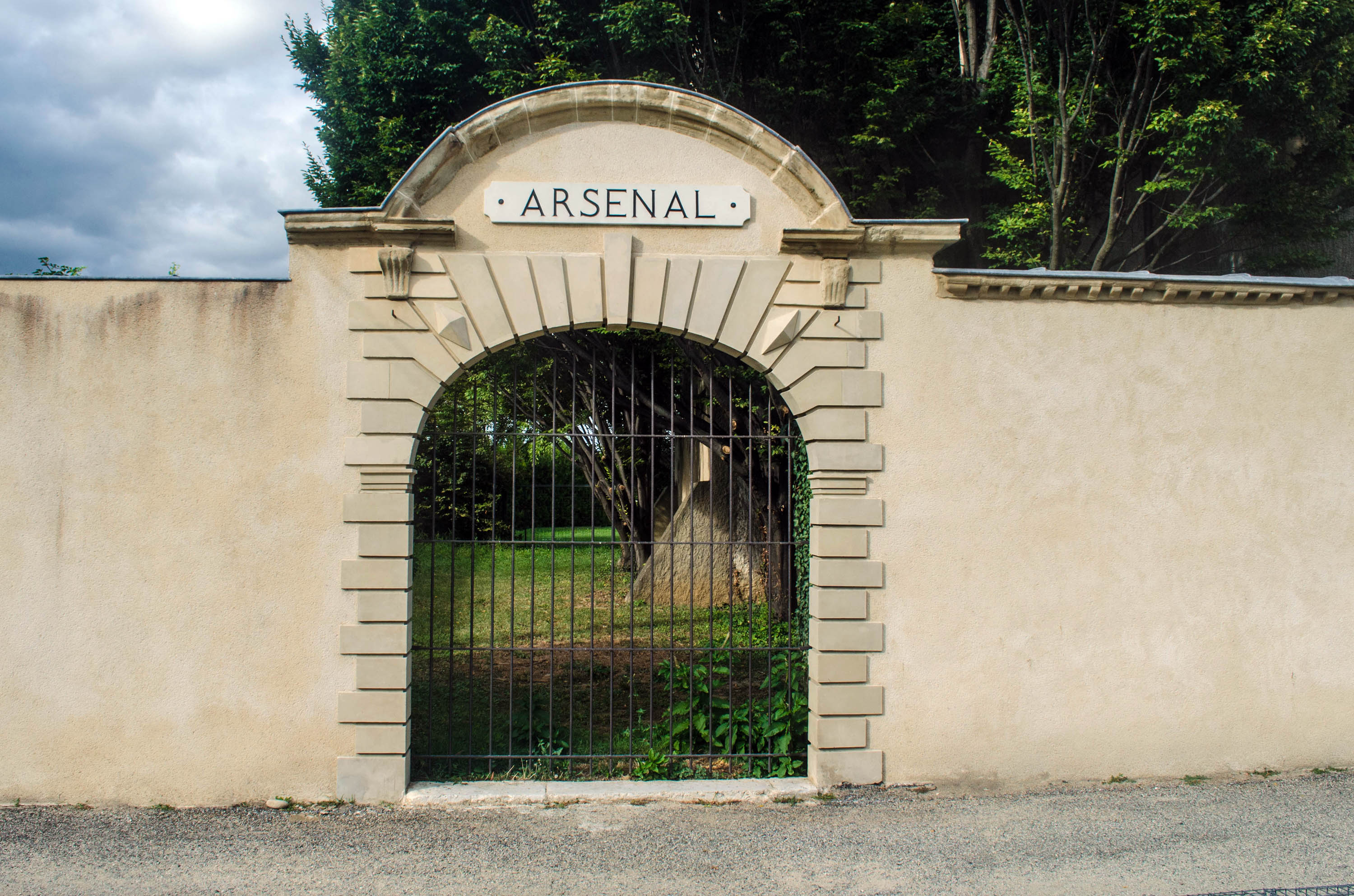 Valence (Drôme), Abbaye Notre-Dame de Soyons, porte de l'ancien arsenal